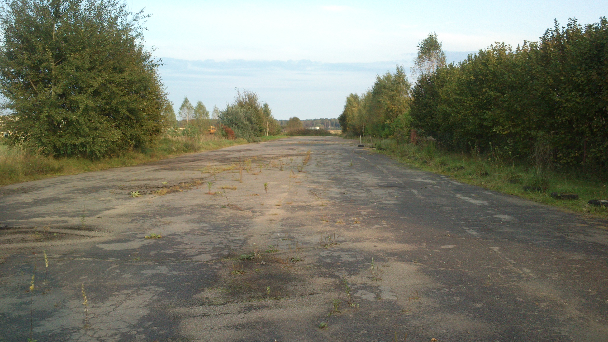 Slēgtā Ķekavas lidlauka rietumu gals